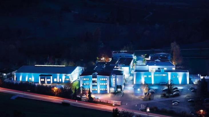 Firmengelände Hekatron 2011